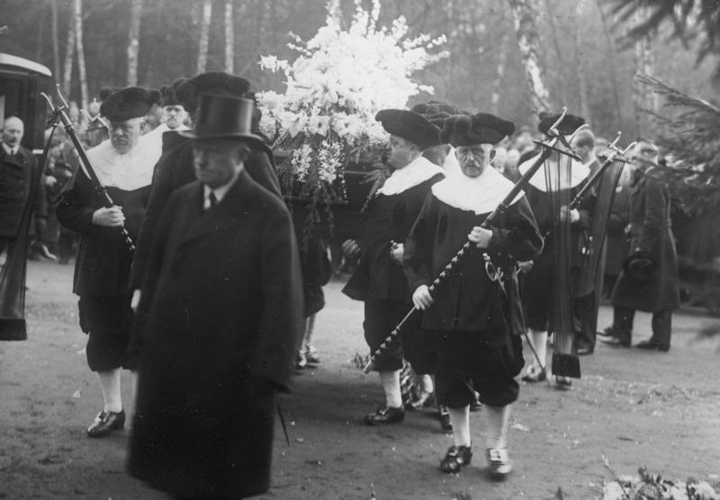 Die feierliche Beisetzung des Reichskanzlers a.D. Geheimrat Dr. [Wilhelm] Cuno, auf dem Ohlsdorfer Friedhof in Hamburg! Die Spitze des Trauerzuges auf dem Friedhof